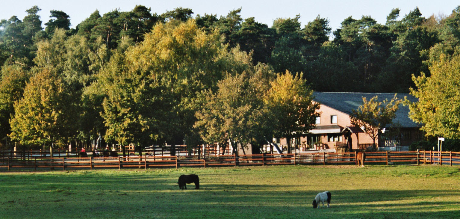 Erholungsgebiet Schemder Bergmark in den Dammer Bergen